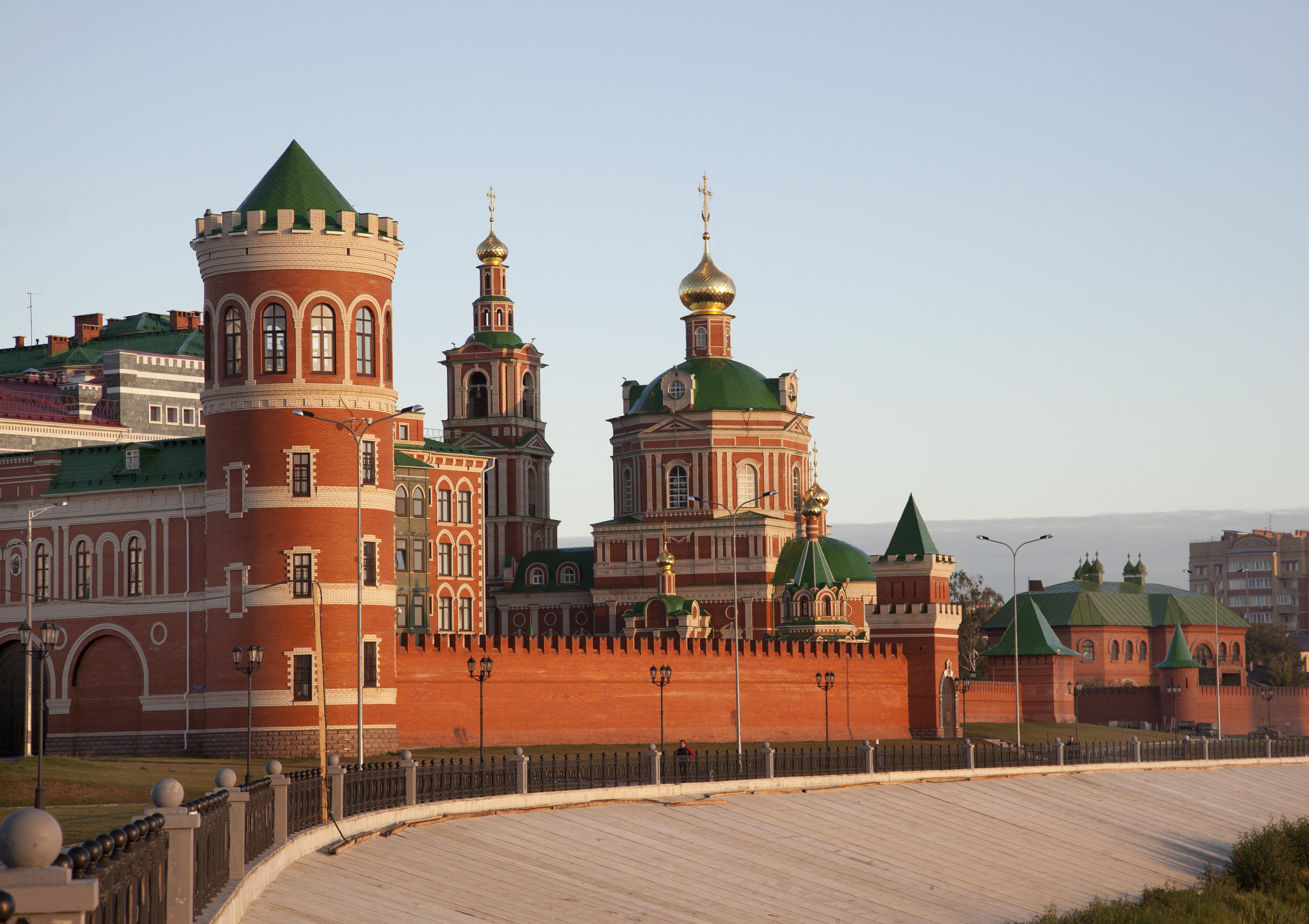 Воскресенская набережная